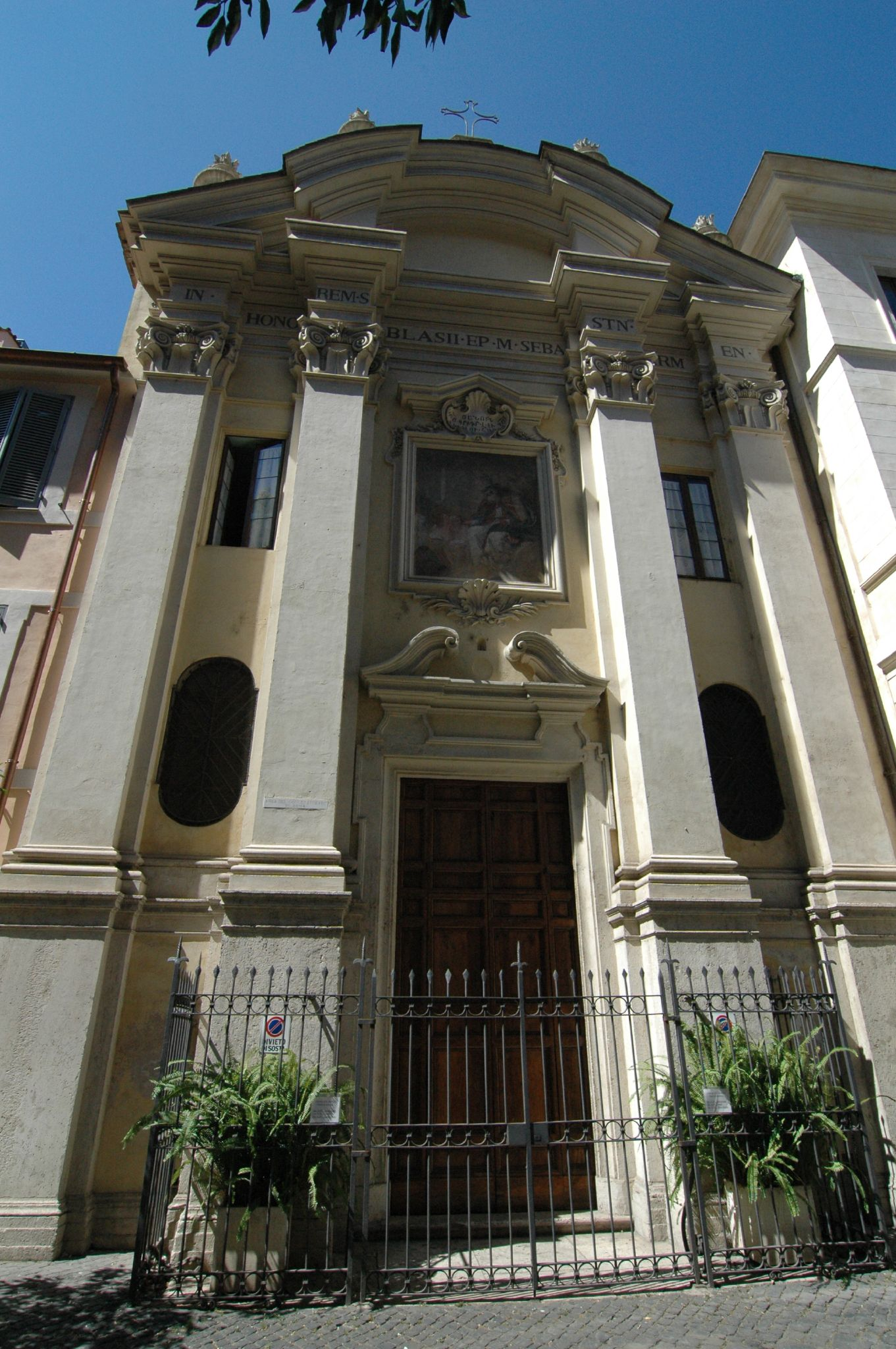 Facciata della chiesa di San Biagio degli Armeni (o della Pagnotta), a Roma, nel rione Ponte.